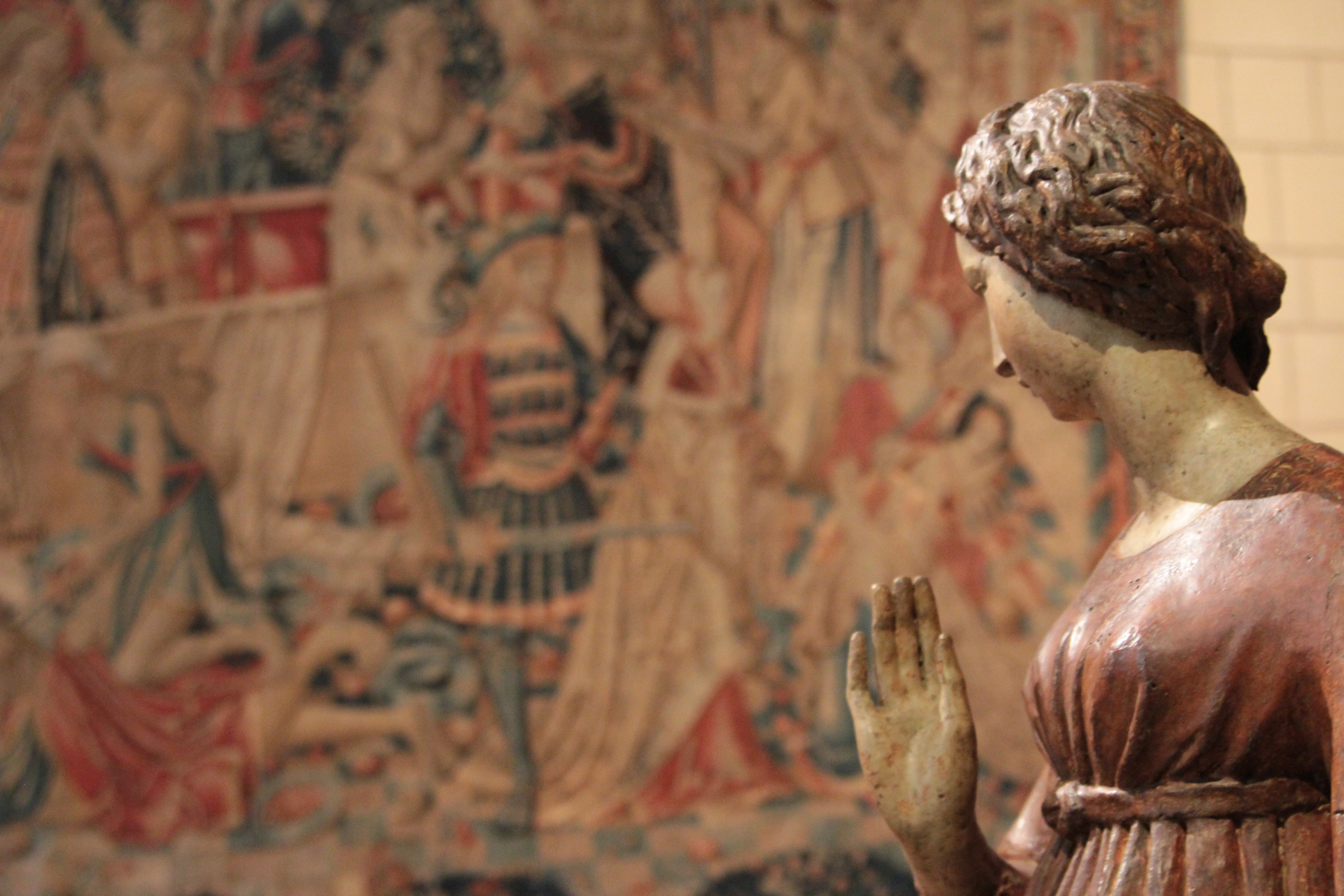 Détail, au musée Château de Villevêque. En arrière plan, la tapisserie du Banquet.